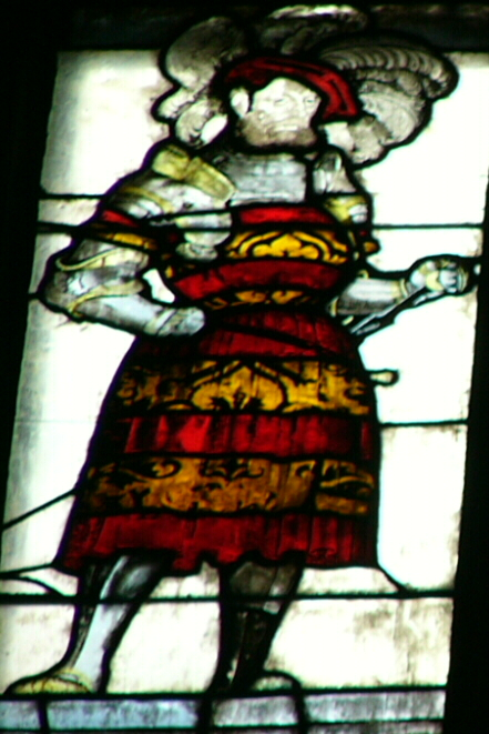 Ausschnitt aus dem Markgrafenfenster von St. Sebald in Nürnberg: Markgraf Kasimir